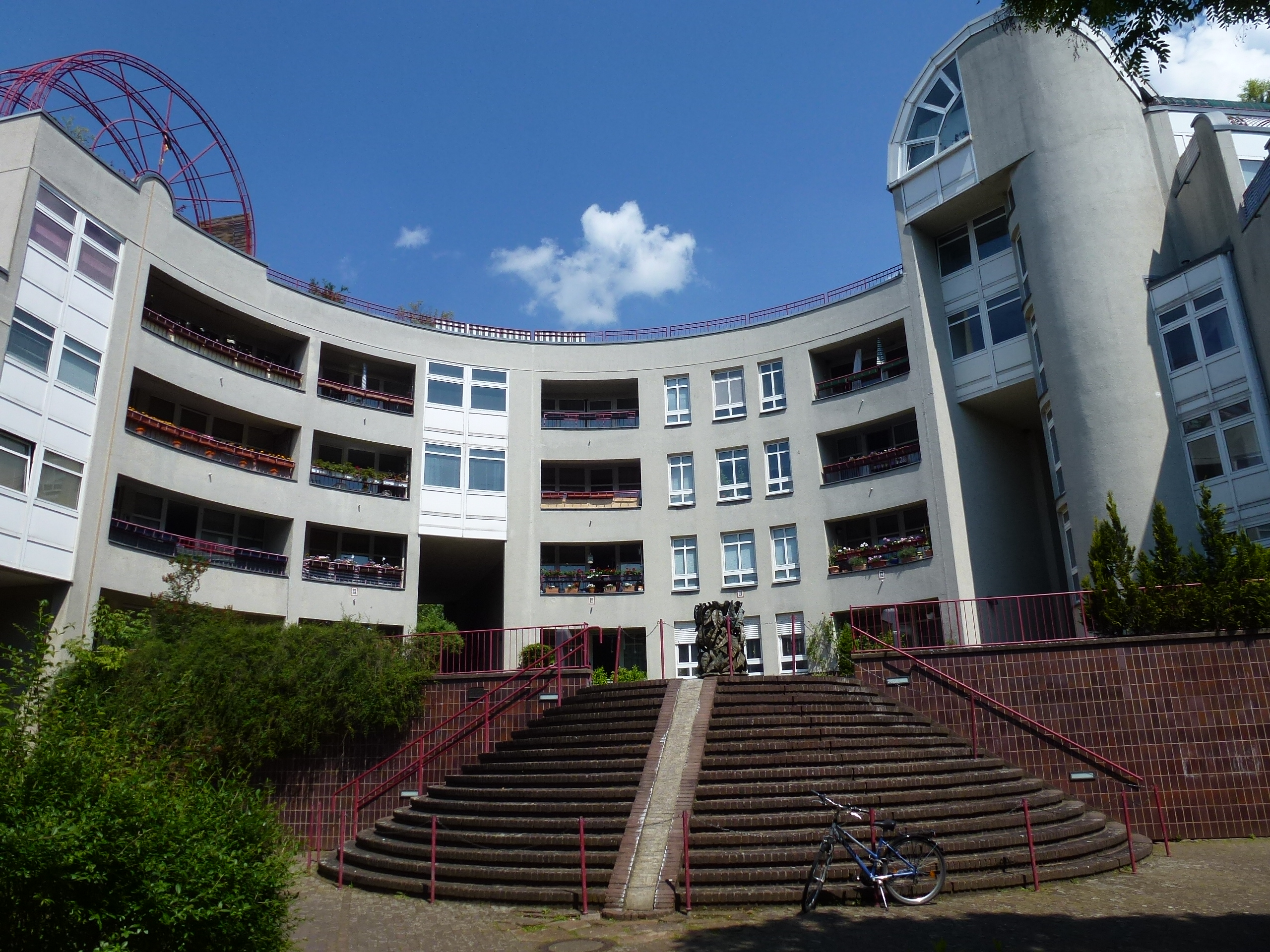 Berlin-Britz Ortolanweg Ortolanschnecke